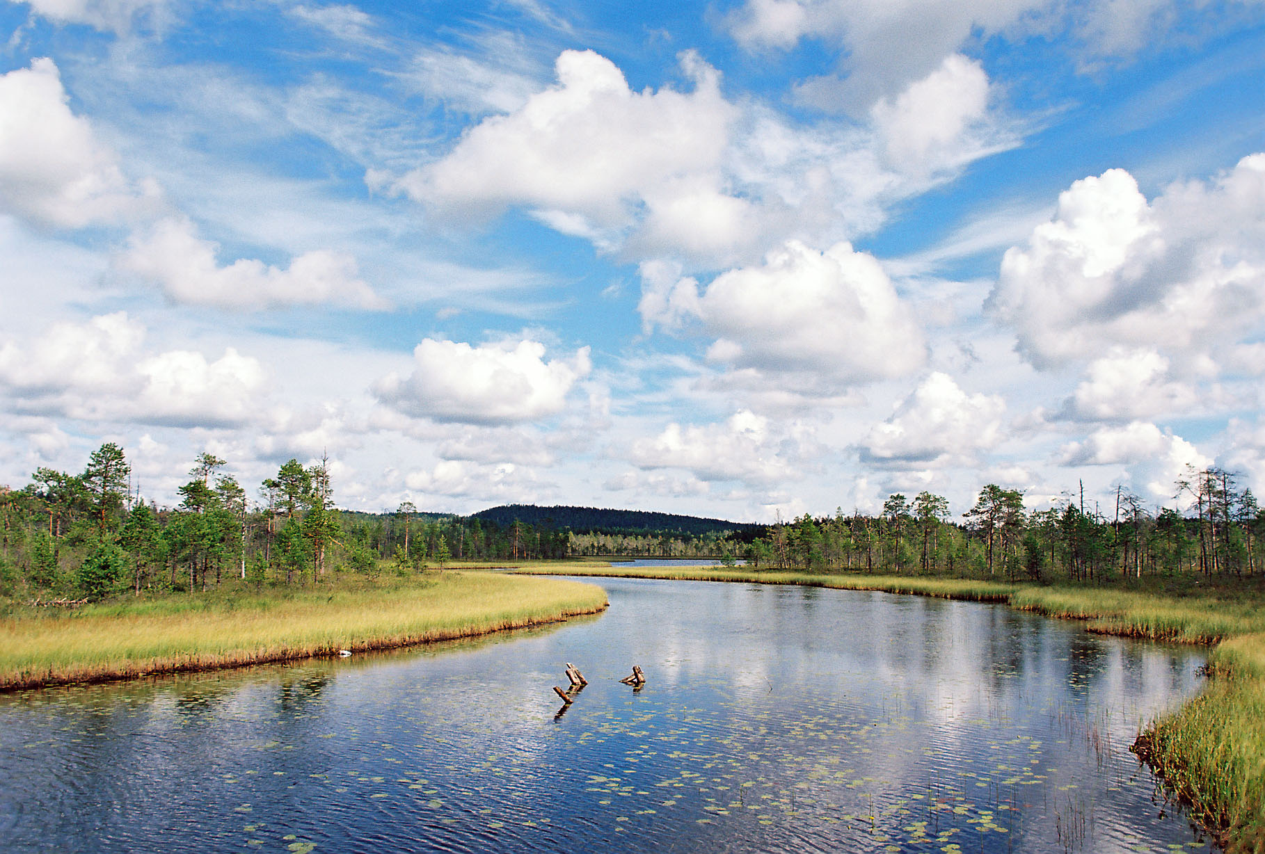 р. Мюгра, вид на Верхнее Шапкозеро